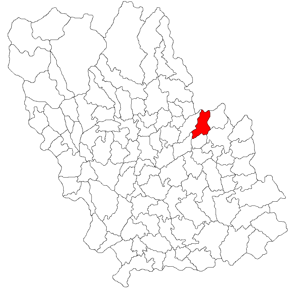 Categorie:Hărţi ale judeţului Prahova